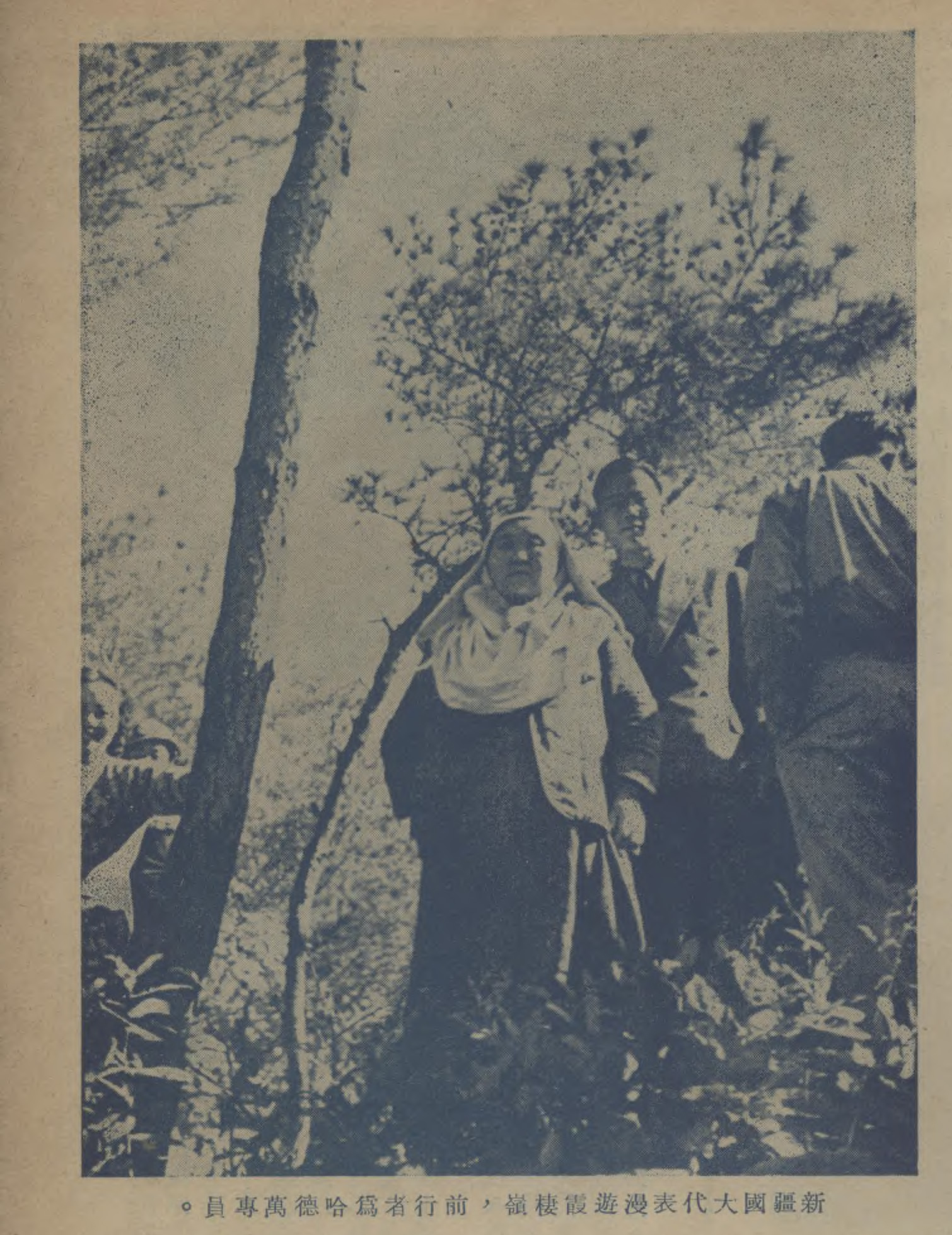 中文（中国大陆）: 新疆省國民大會代表於制憲國民大會在全國遊歷